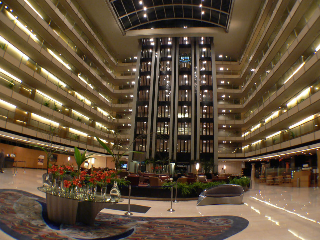 Buenos Aires Hilton - atrium